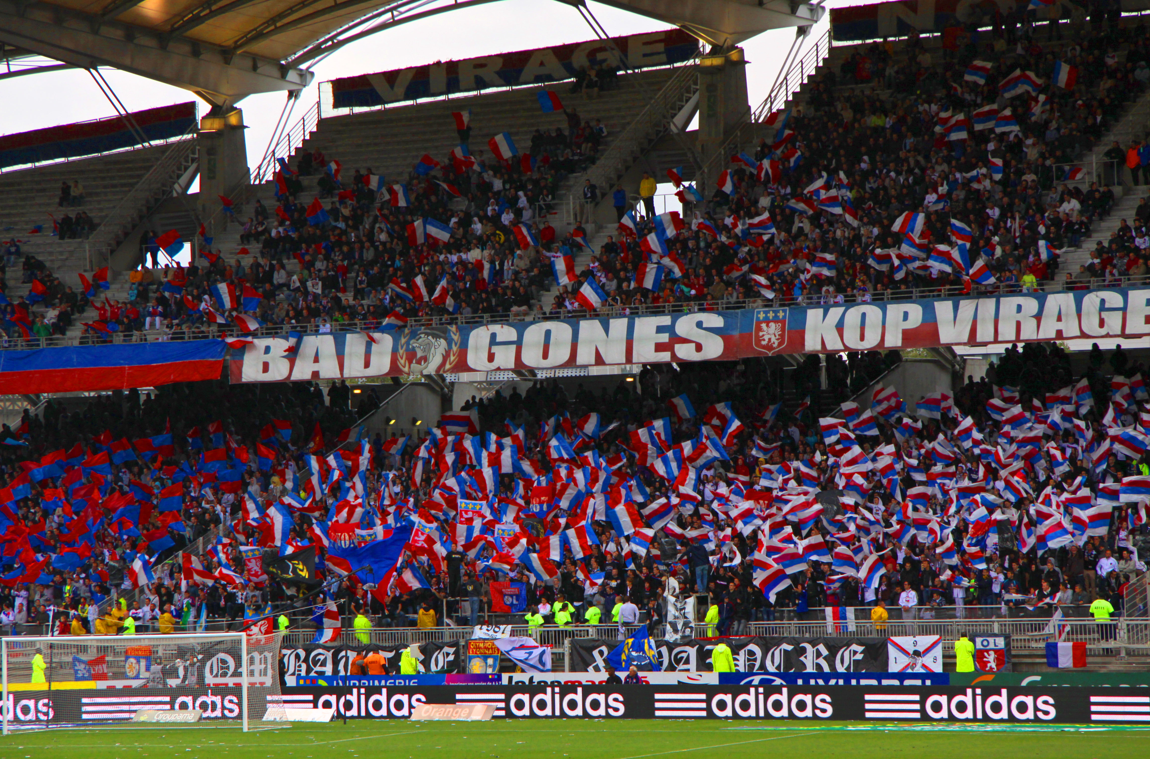 Lyon. OL - Valenciennes au stade Gerland.